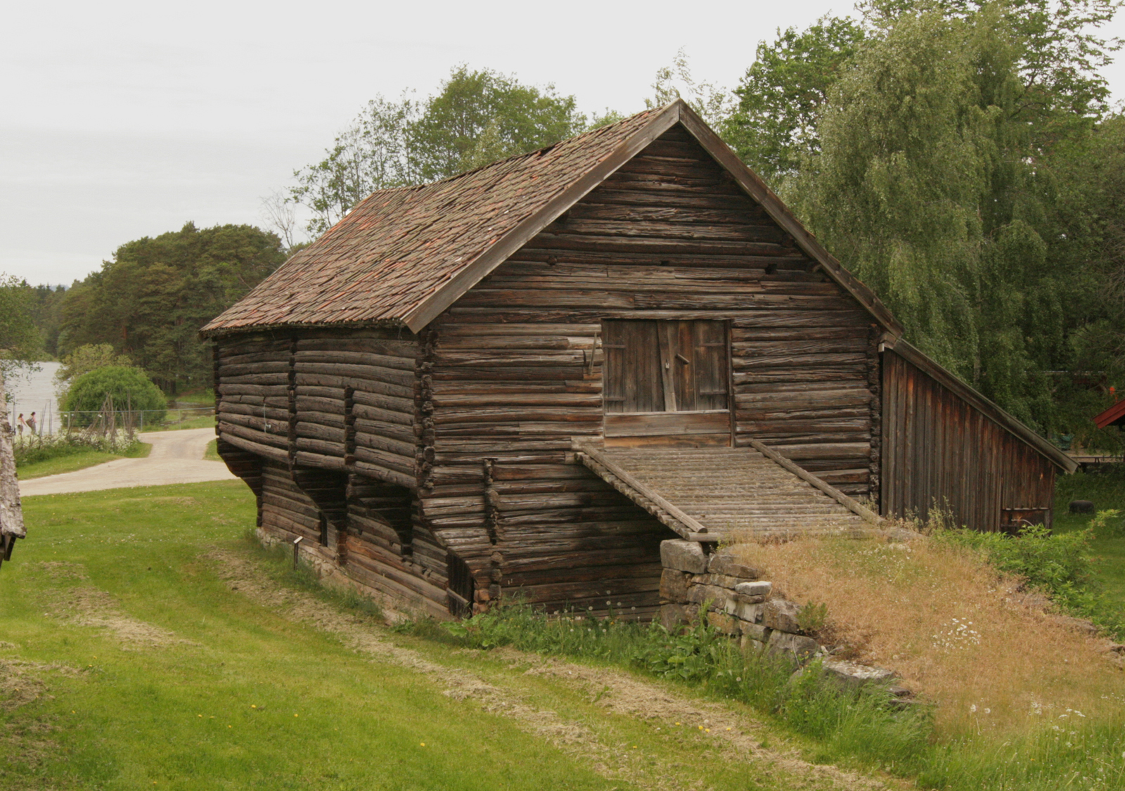 Stall-låve fra Jemtland østre, Veldre, Ringsaker. Oppført tidlig på 1800-tallet. I dag på Hedmarksmuseet, Hamar.